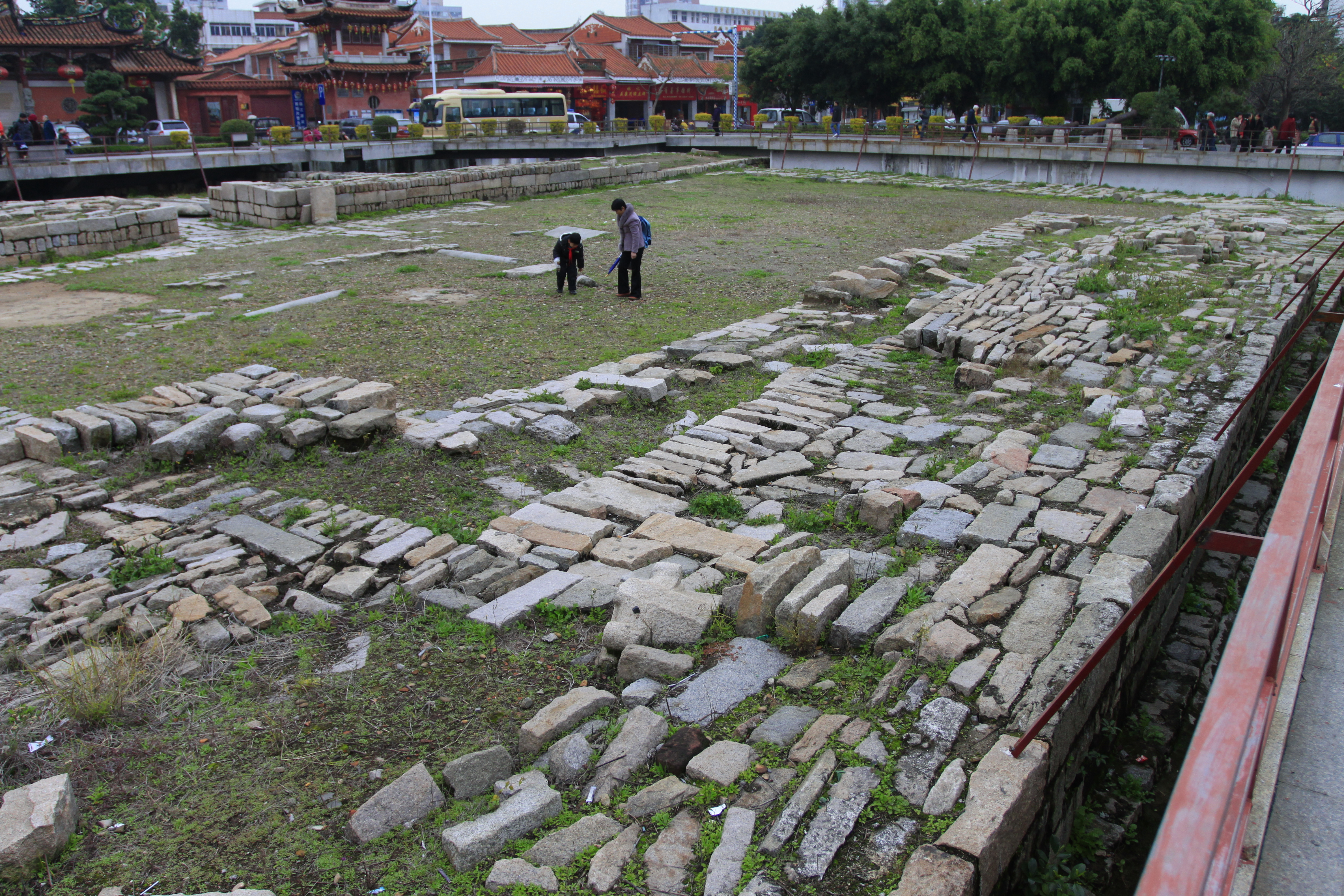 德济门遗址，位于中国福建省泉州市，是全国重点文物保护单位。